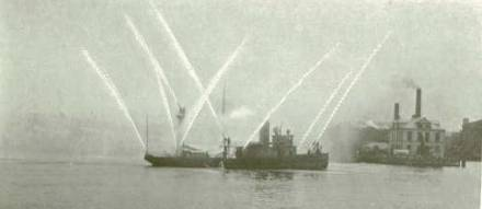 Baltimore Fireboat Deluge - President Street (1912).